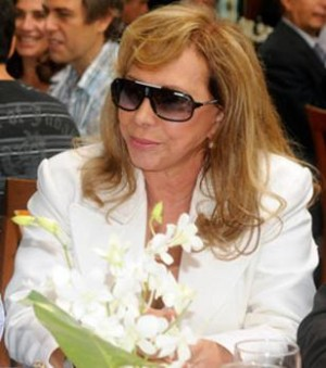 Atriz brasileira Arlete Salles em imagem do acervo da TV Brasil.